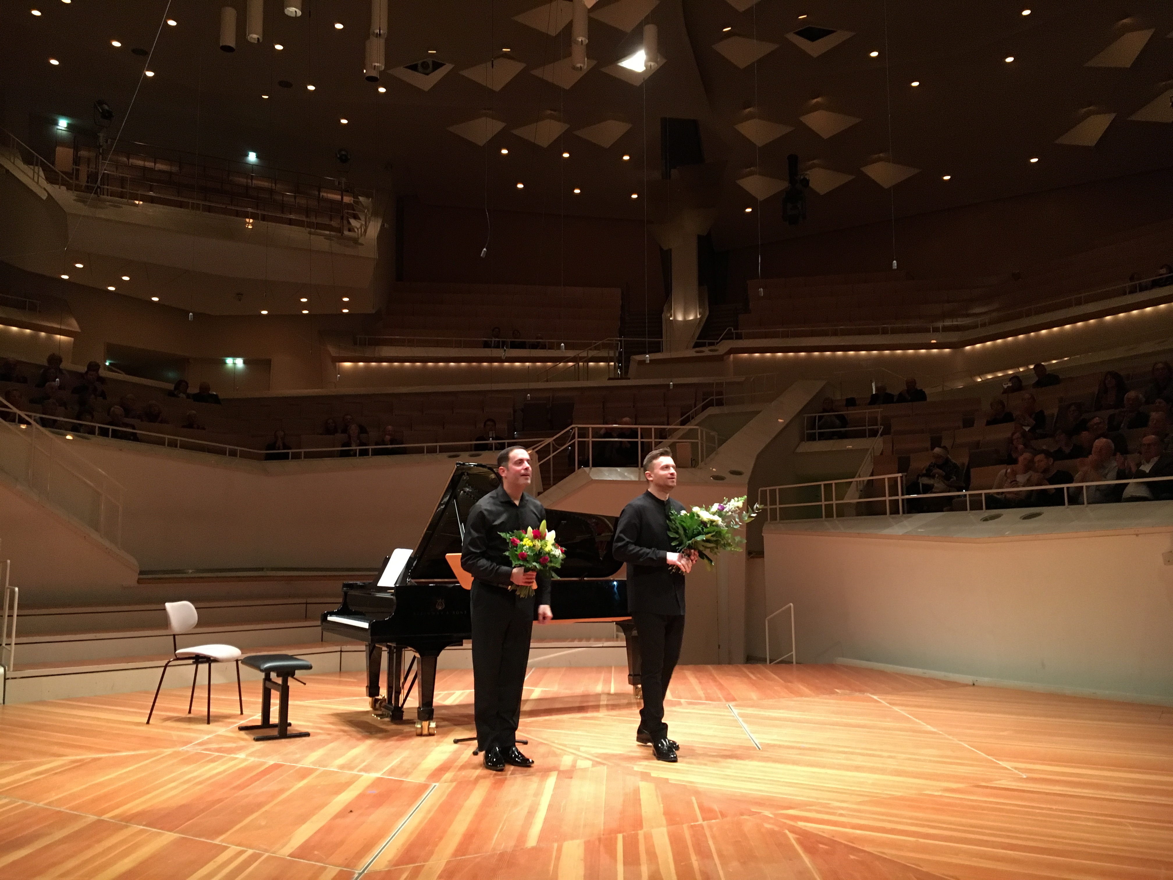 Schlussapplaus für Pavol Bresliks und Pianist Amir Katz' "Winterreise" am 04.02.2018 im Kammermusiksaal der Philharmonie Berlin